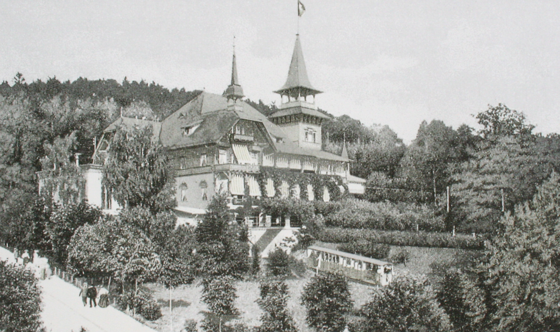 Hotel Waldhaus Dolder mit Drahtseilbahn um 1905